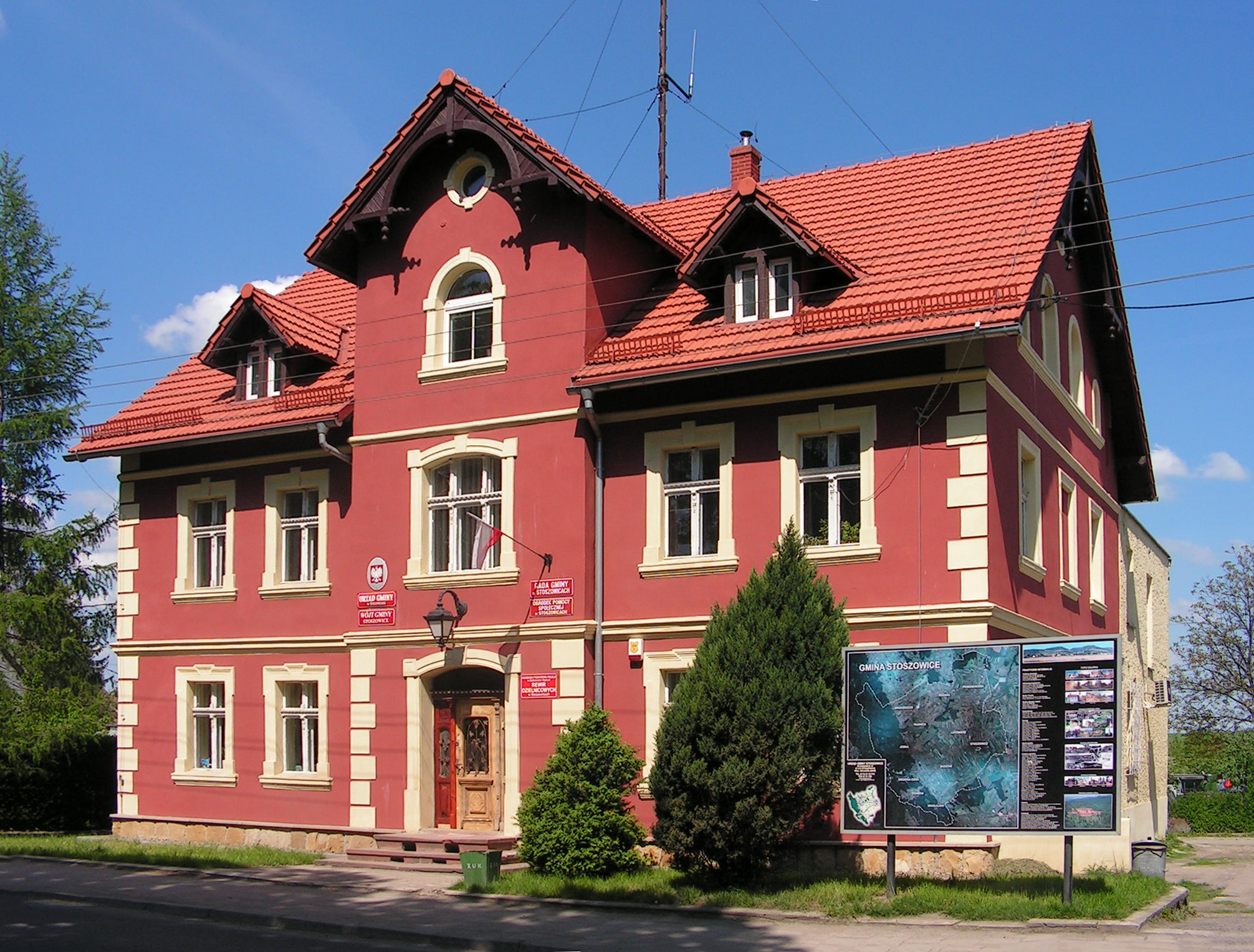 Stoszowice Urząd Gminy